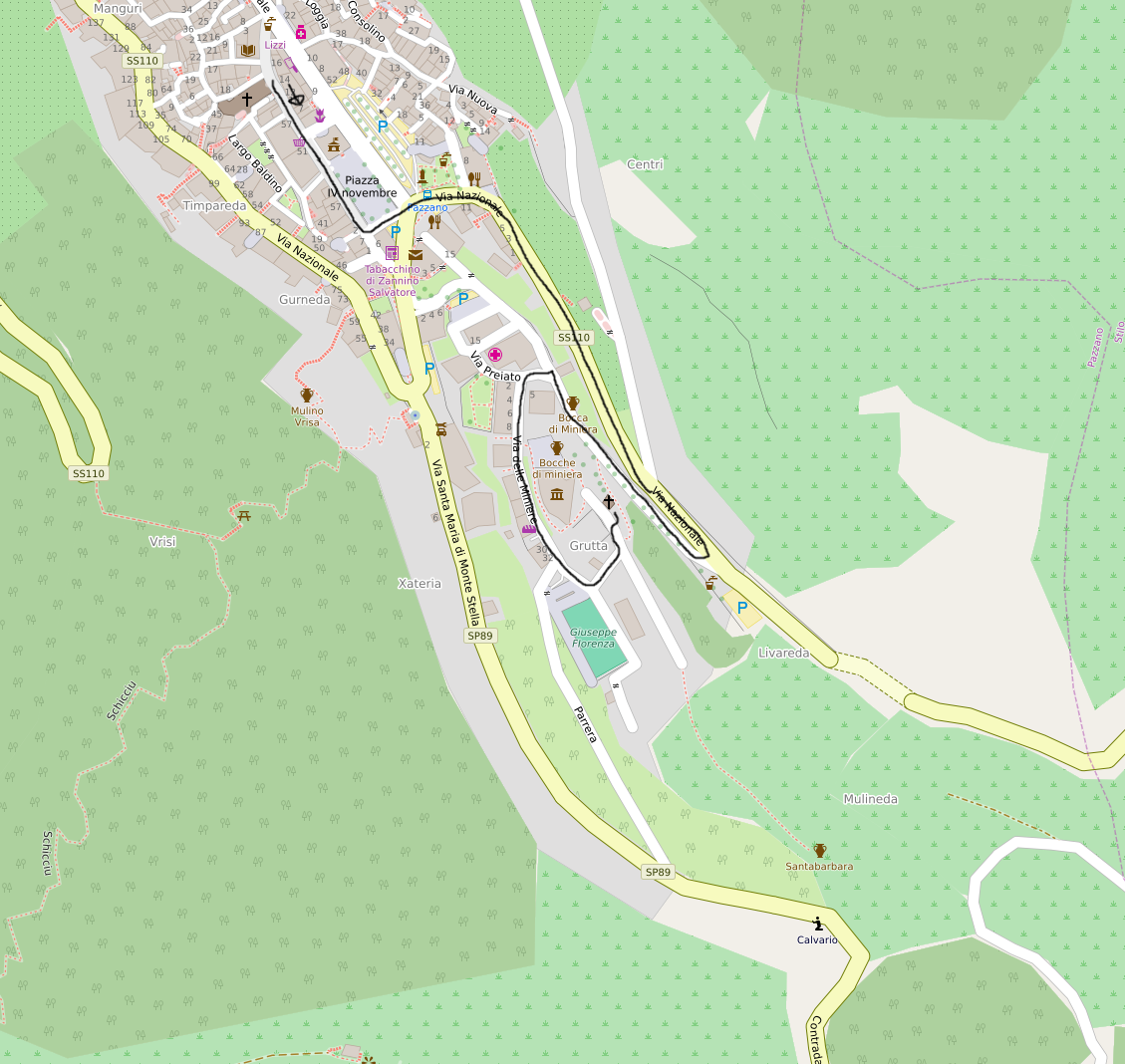 Carta con percorso del sabato sera Processione del Santo Salvatore Festa del Santo Salvatore a Pazzano Carta creata nel 2016